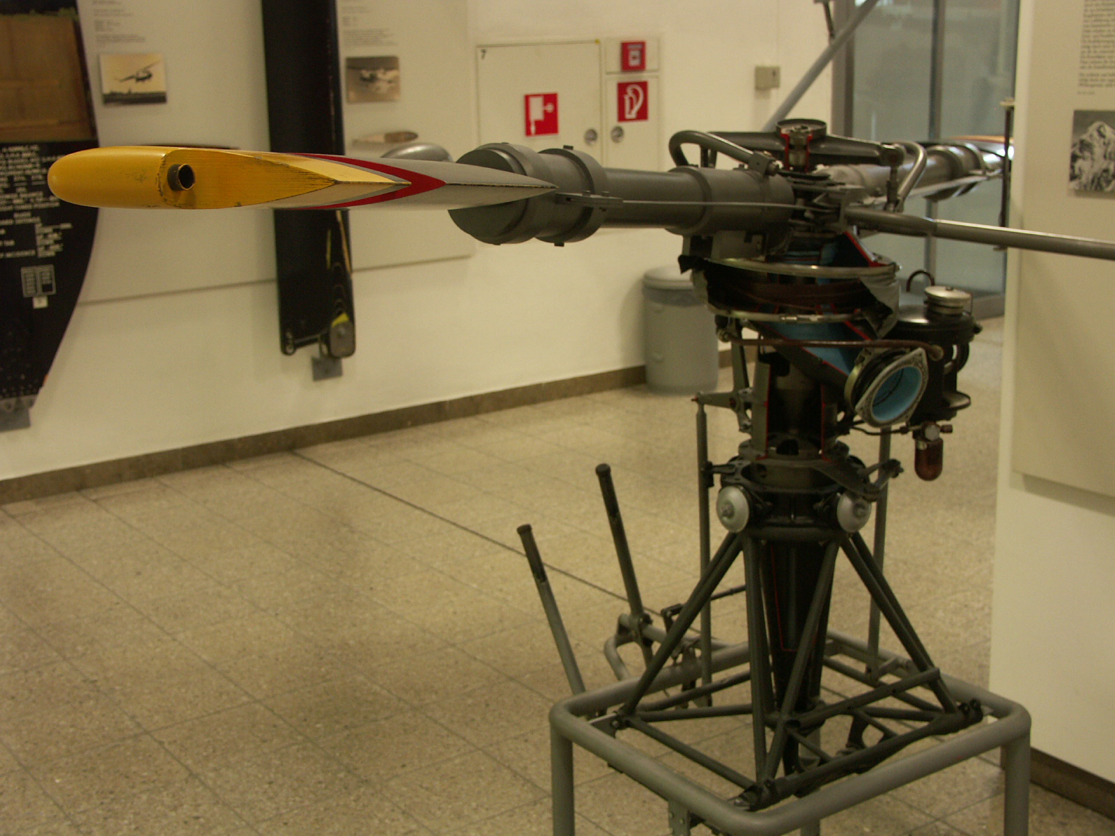 Deutsches Museum Munich Photo Jean-Patrick Donzey